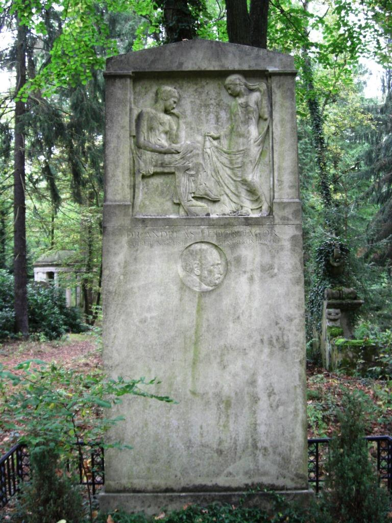 Grab des Ethnographen und Forschungsreisenden Andreas Fedor Jagor (1816-1900) auf dem Südwestkirchhof in Stahnsdorf